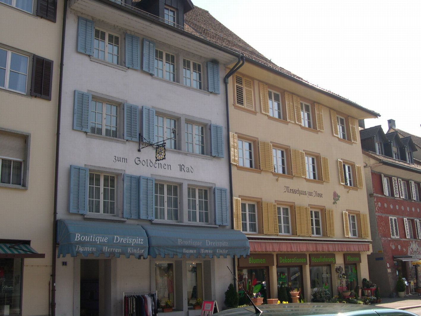 Zum Goldenen Rad und Messehaus zur Rose auf der Nordseite der Schwertgasse in Zurzach